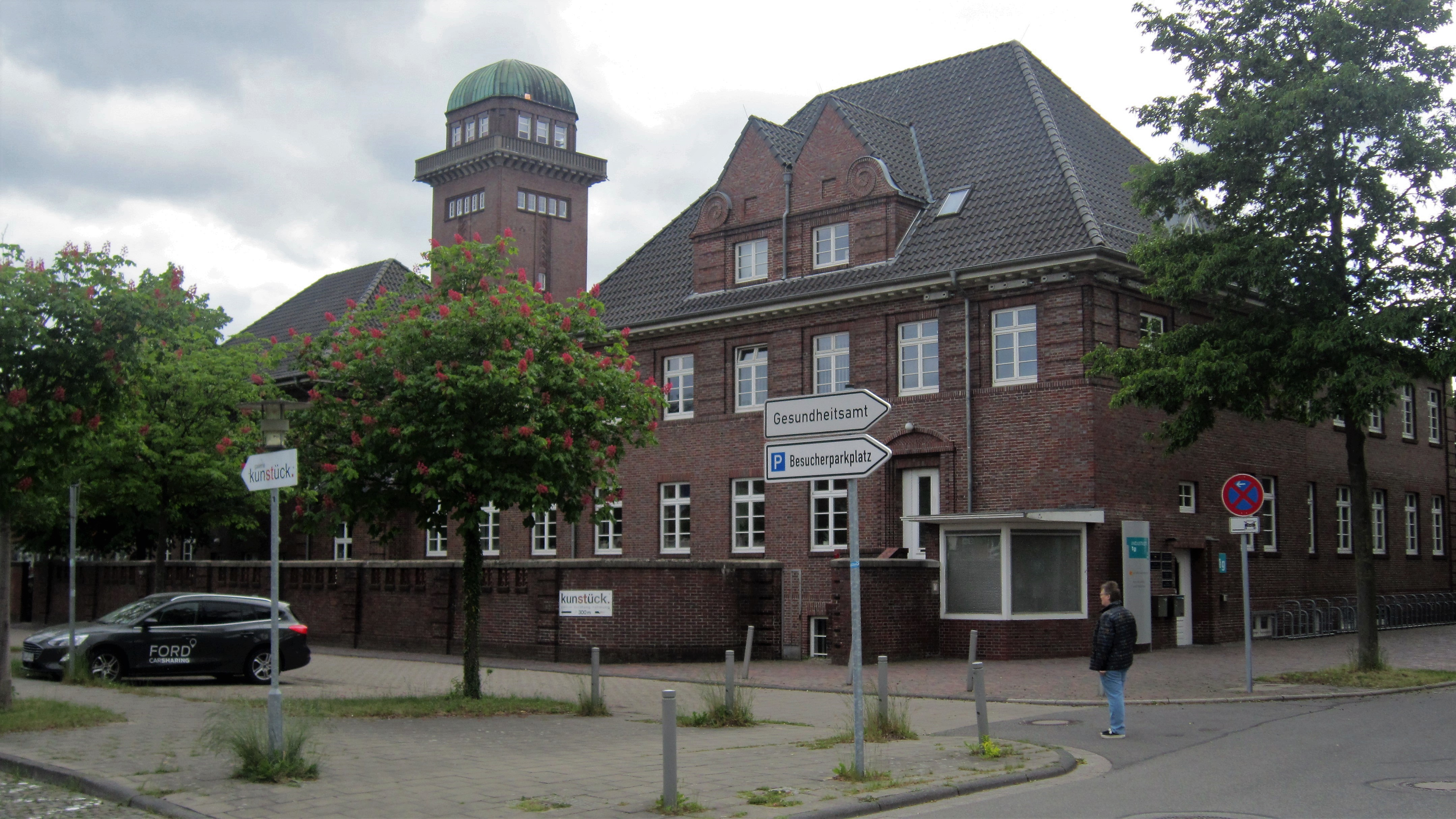 Gelände der 1923 errichteten ehemaligen Bölts Fleischwarenfabrik (Alte Fleiwa). Im Hintergrund der Wasserturm im EWE-Forum, vorne rechts das Technische Rathaus der Stadt Oldenburg